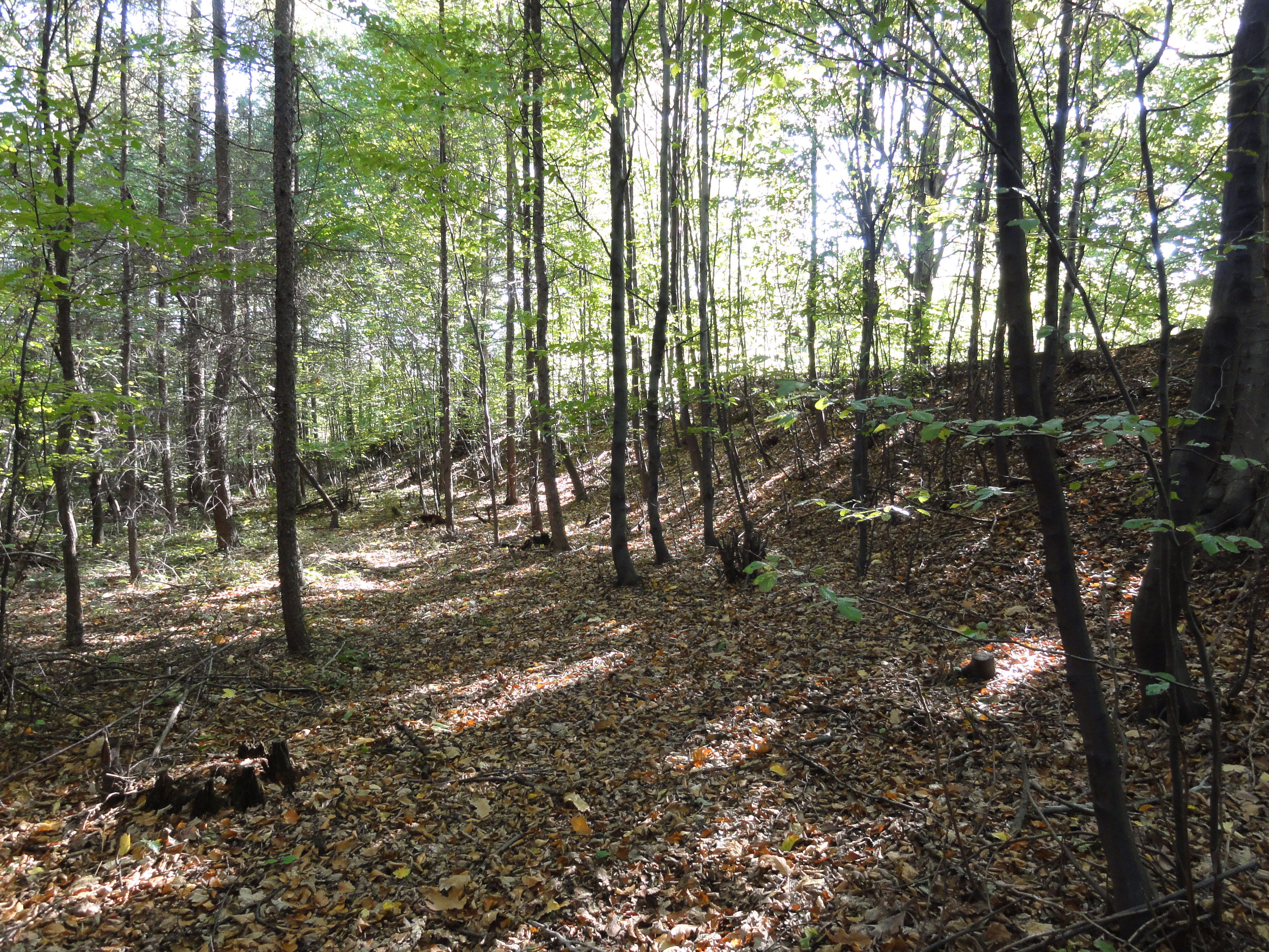 Międzyświeć Grodzisko 7 - majdan (L) i obwałowanie zachodnie (P)